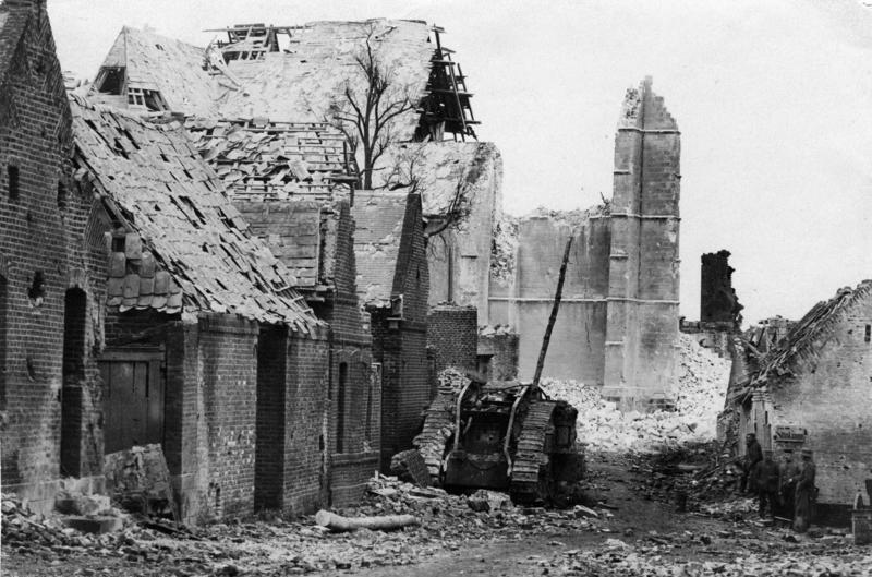 Zerstörter englischer Tank in den Ruinen von Fontaine-Notre-Dame, 4 km westl. Cambrai (Nordfrankreich), Nov. 1917 Information added by Wikimedia users.